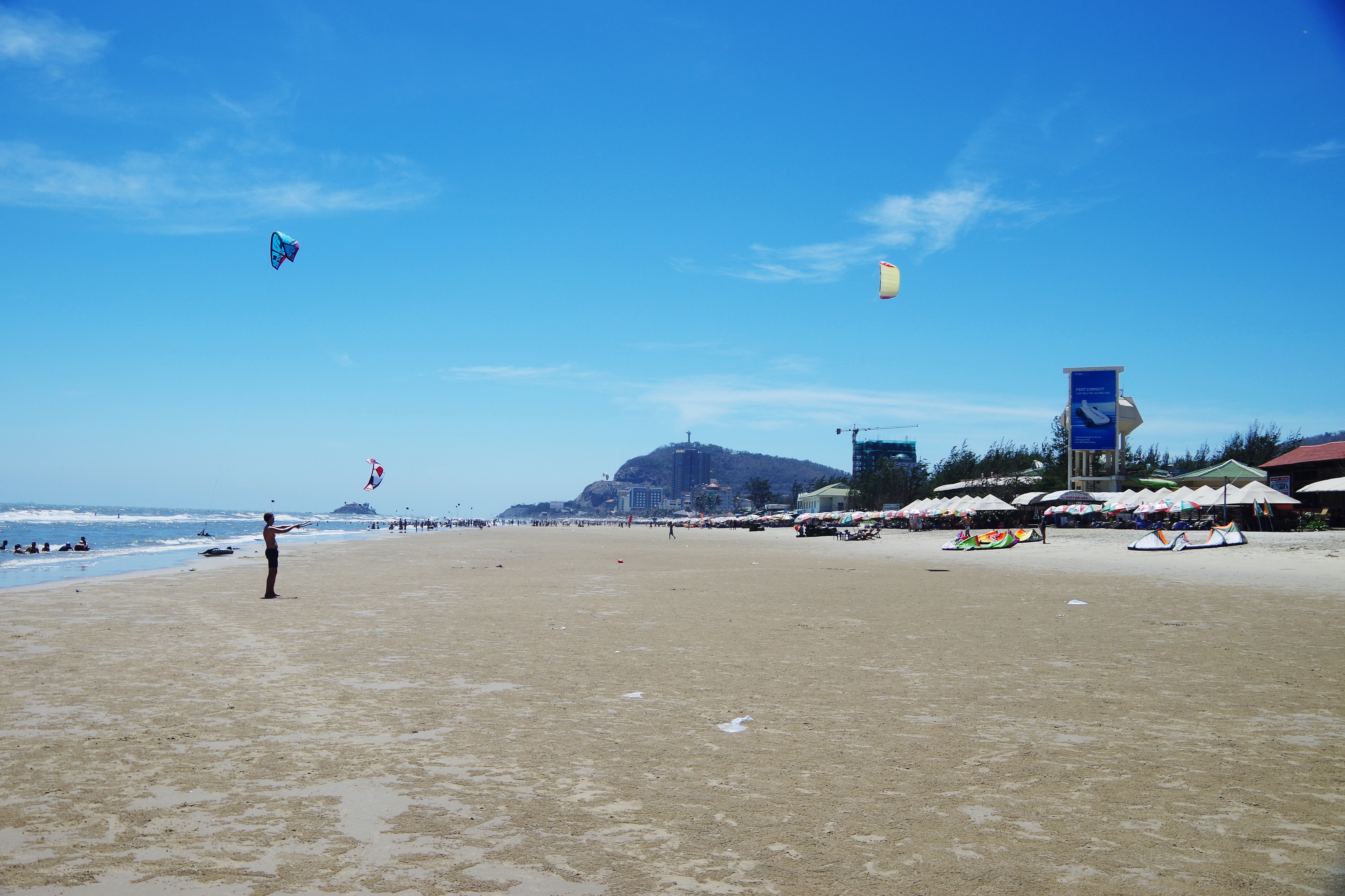 Strand Vung Tau